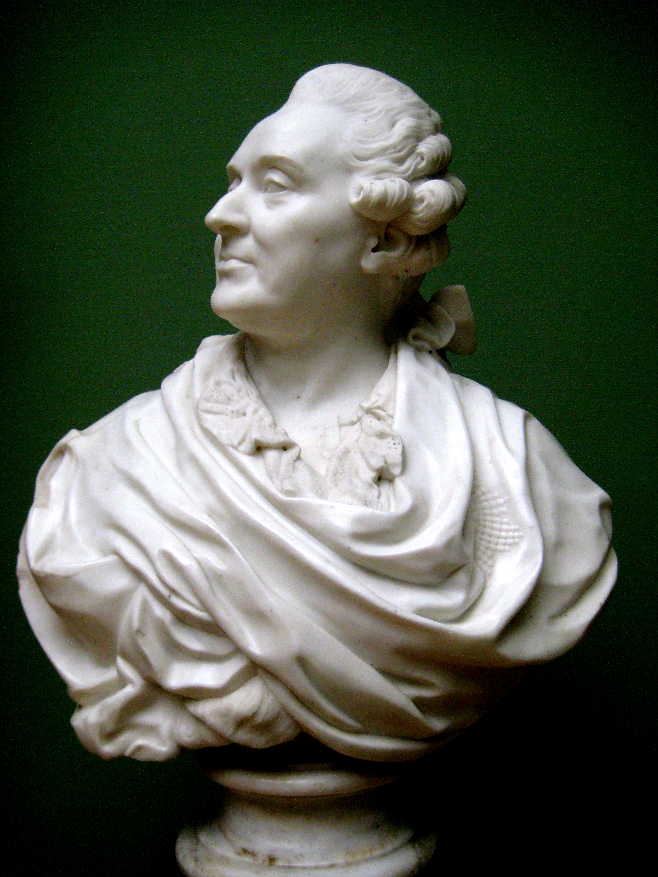 А.М. Голицын. Бюст работы Ф.Шубина. 1773. ГТГ